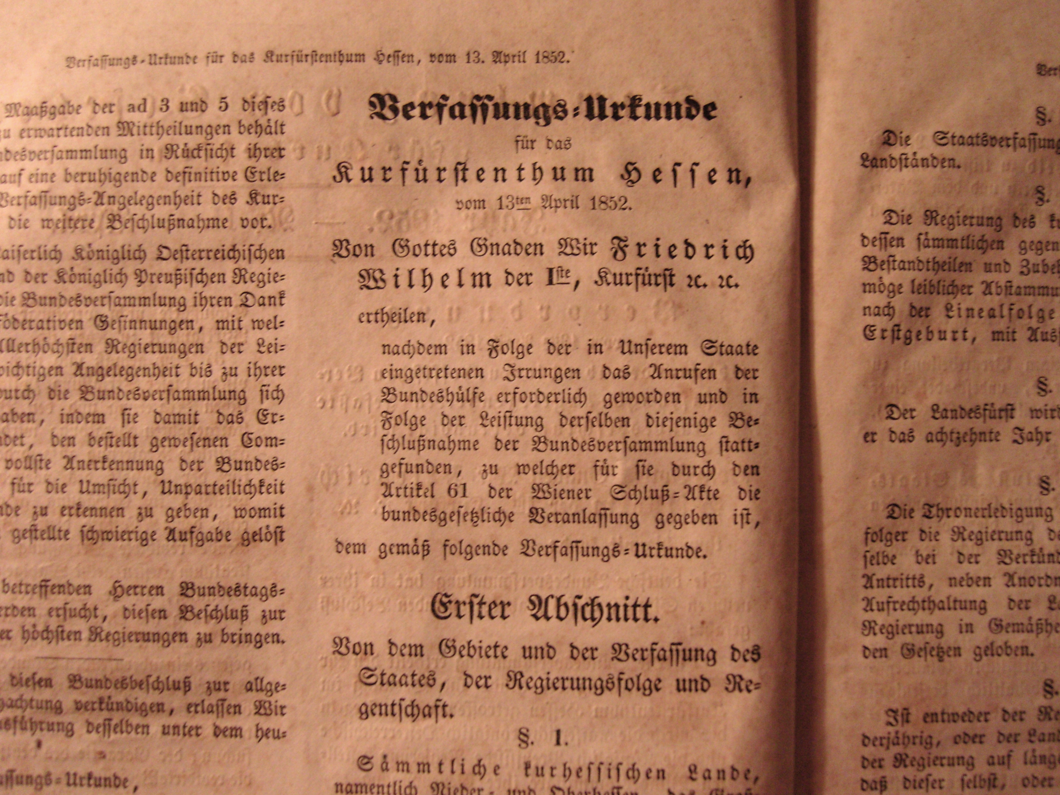 Foto eines Drucks der Kurhessischen Verfassungsurkunde von 1852